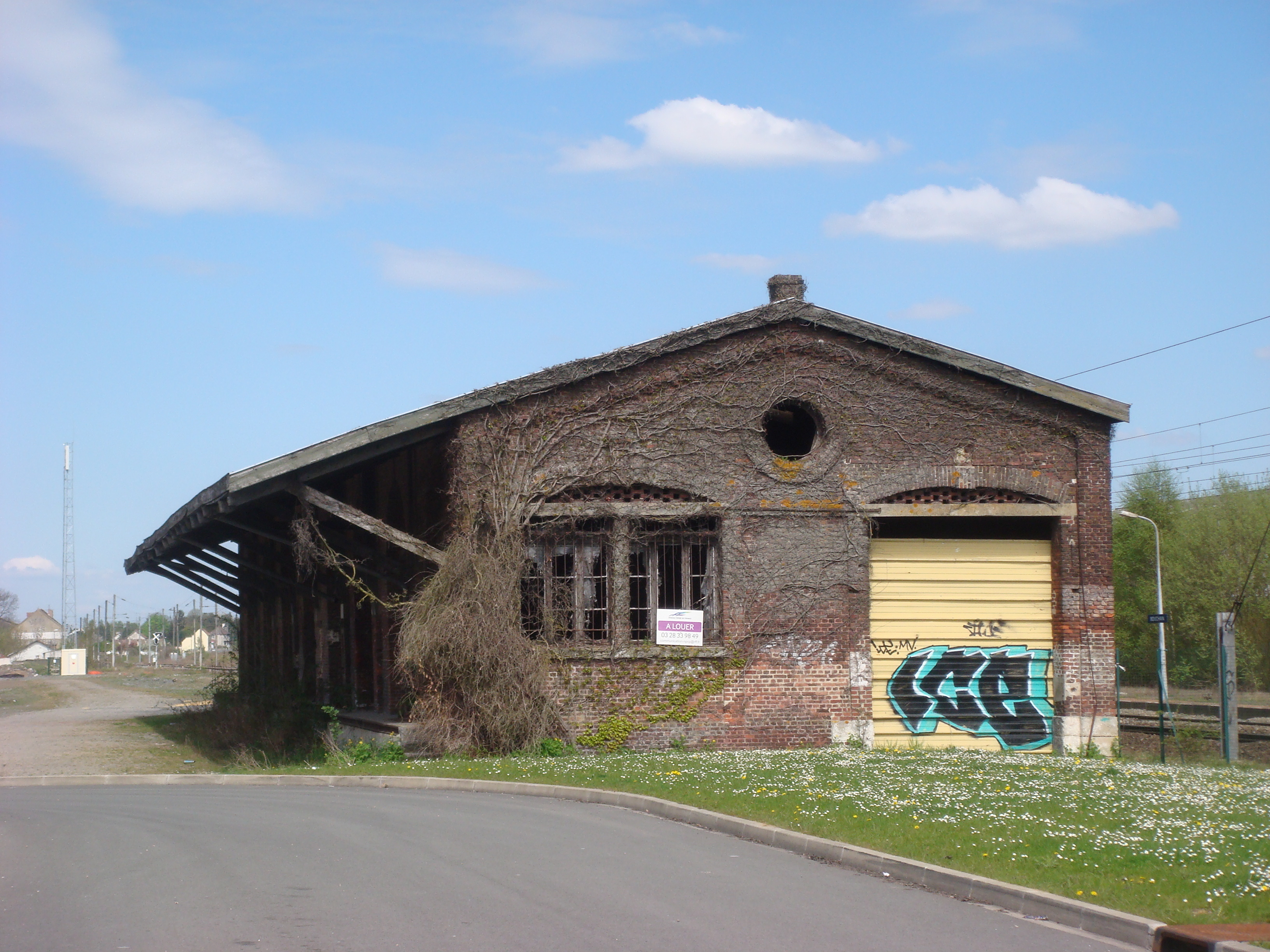 Gare de BOUCHAIN (59) -Halle marchandises en 2013